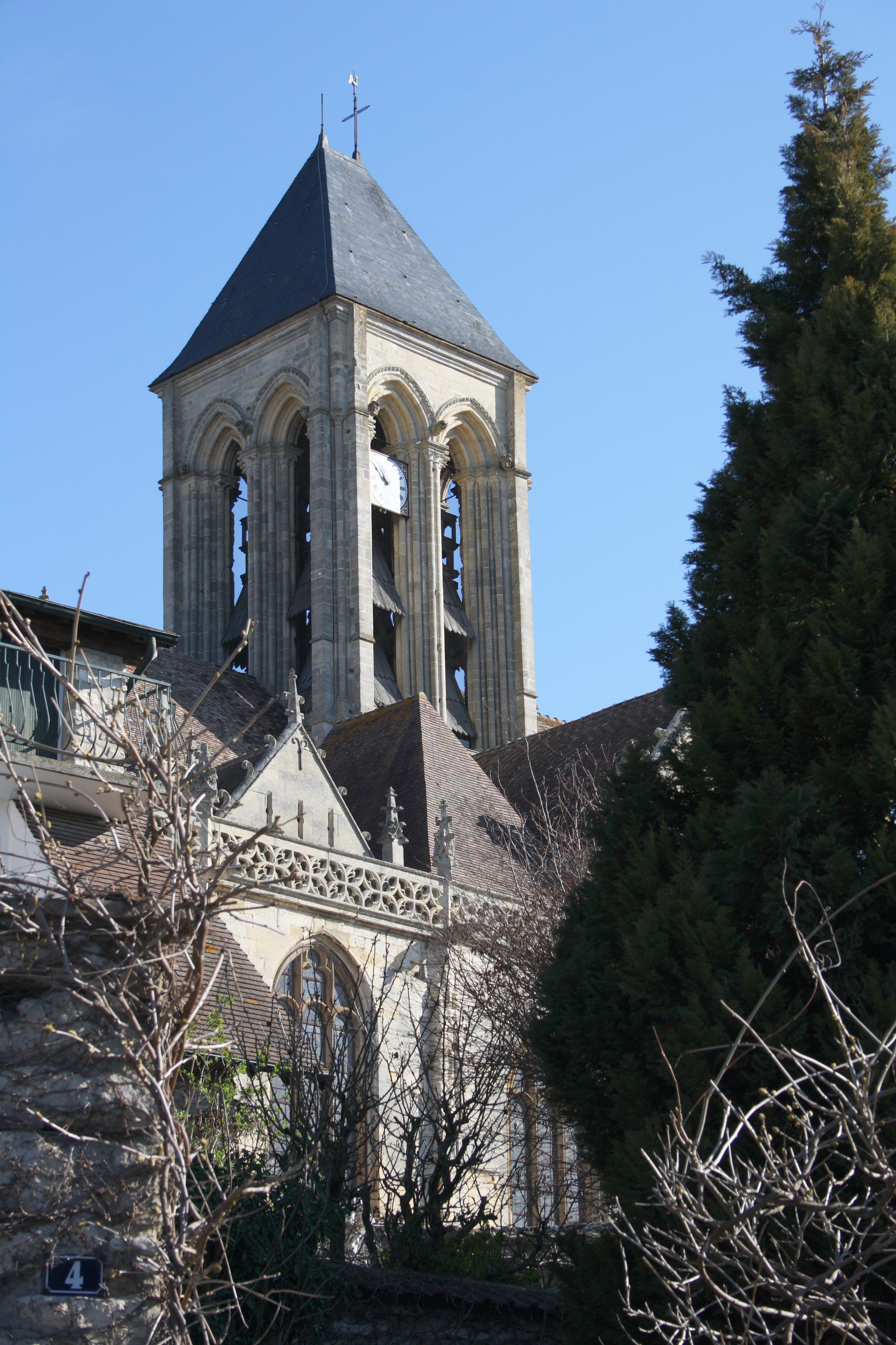 Kirche Notre-Dame in Vétheuil